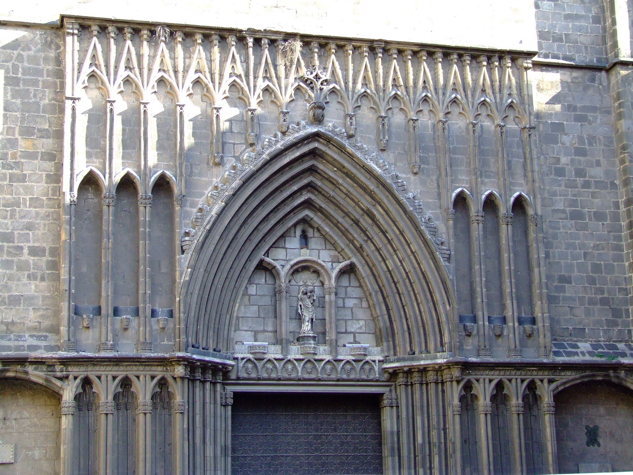 Santa Maria del Pi, Barcelona, Spain